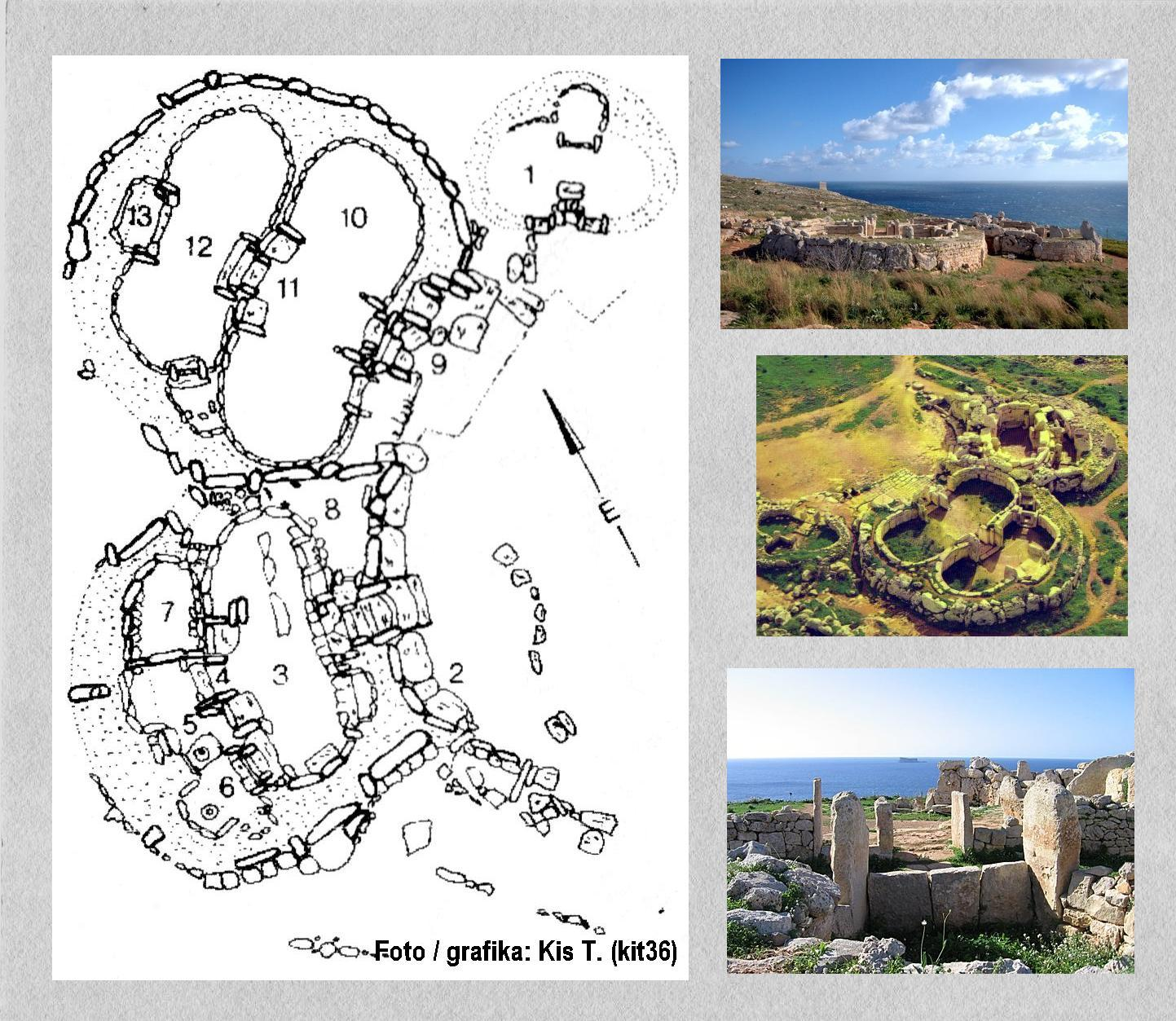 Megalit templom és alaprajza (Mnajdra, Málta)